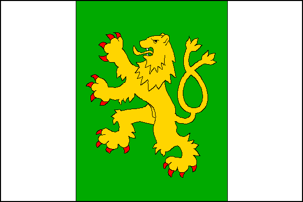 vlajka, Veselíčko, okres Přerov